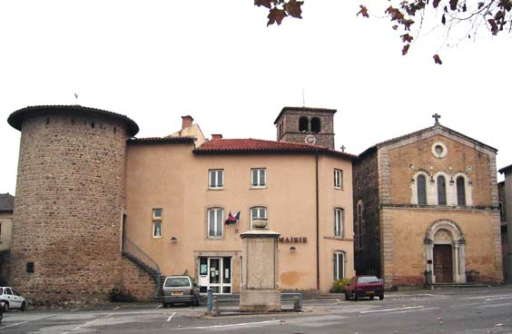 Vue de la place de Brindas : tour, mairie, église... (Photo "standard" sur laquelle j'abandonne tout droit)